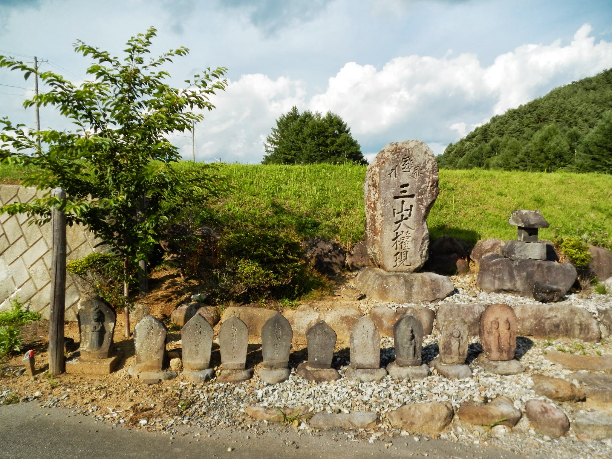 Izumino, Chino, Nagano Prefecture 391-0214, Japan